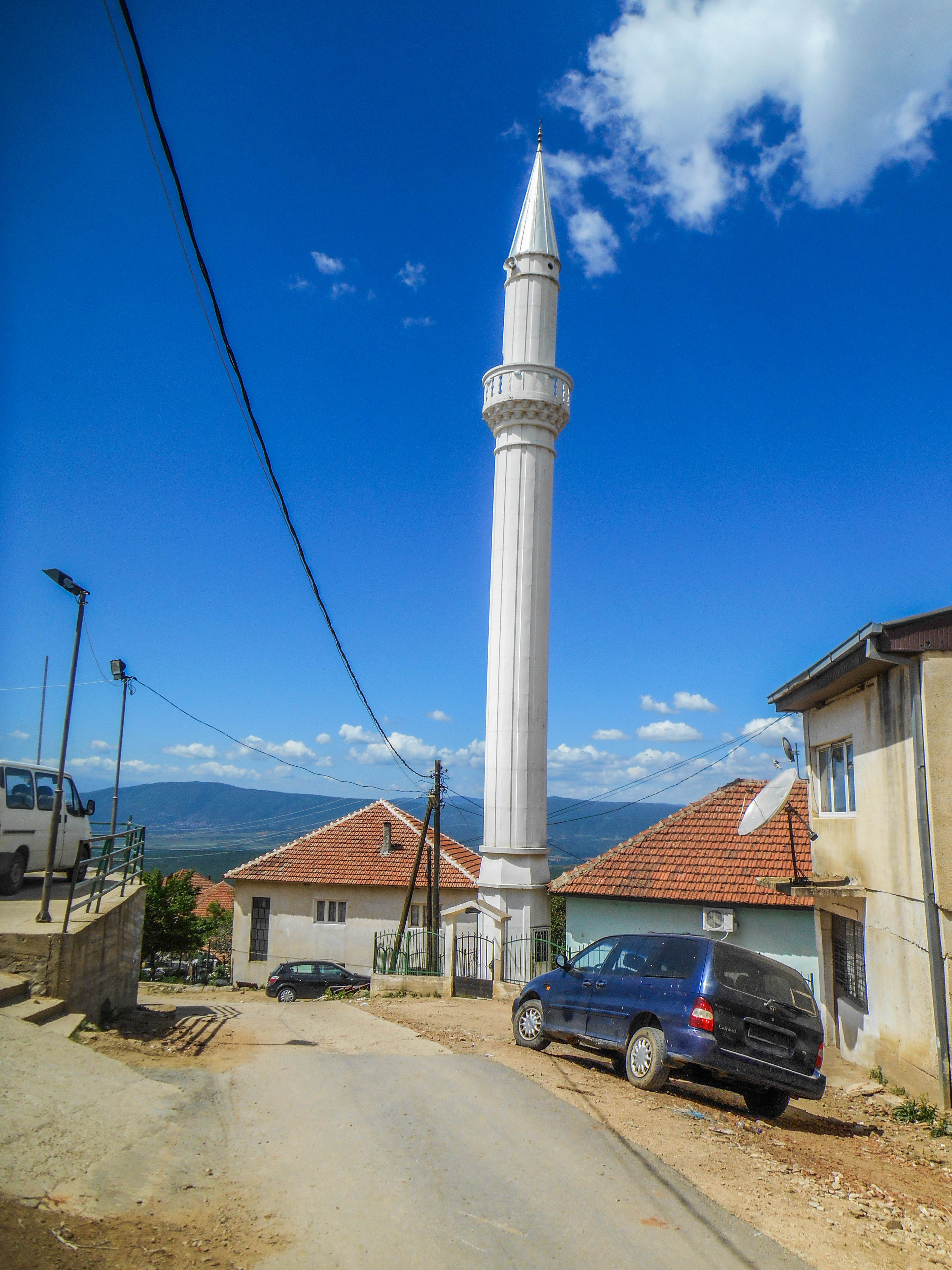 Џамија во Висока Маала